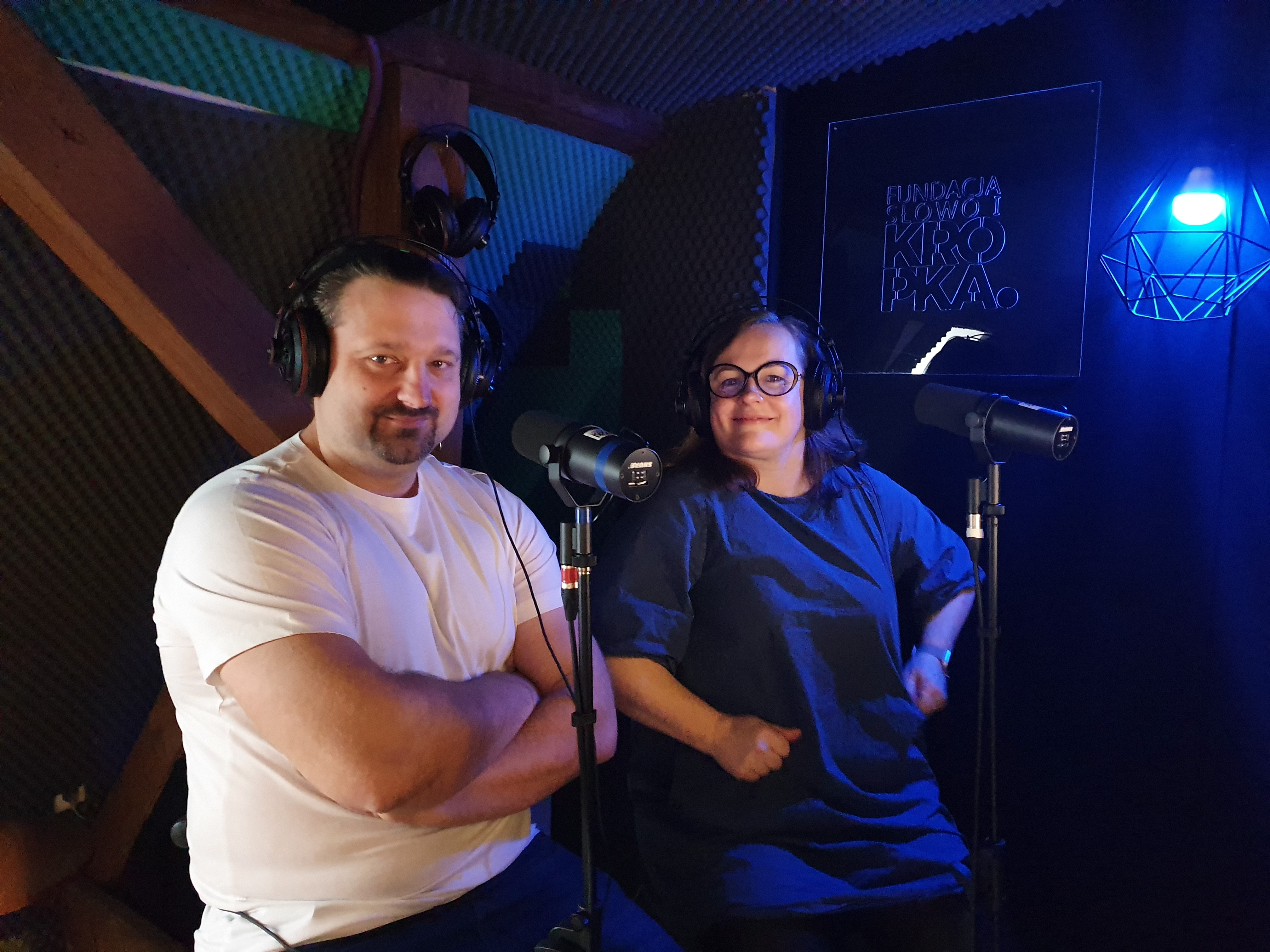 Joanna Kołaczkowska i Łukasz Pietsch w studiu Fundacji podczas nagrania bajki, styczeń 2020r.